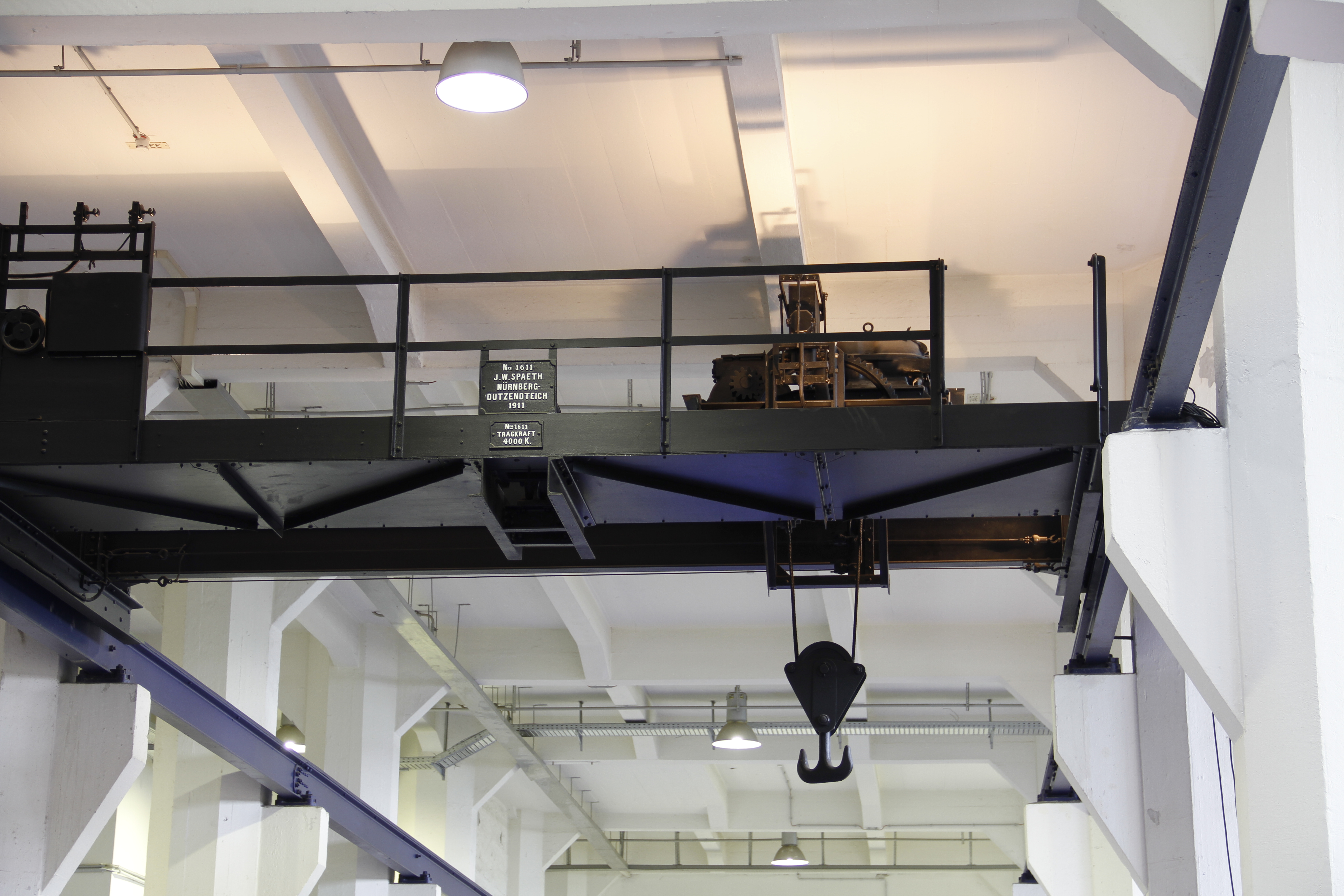 Deckenkran auf Laufschinen im Erdgeschoss der Zollhalle, Tragkraft 4t, Hersteller J.W. Spaeth, Nürnberg-Dutzendteich, 1911